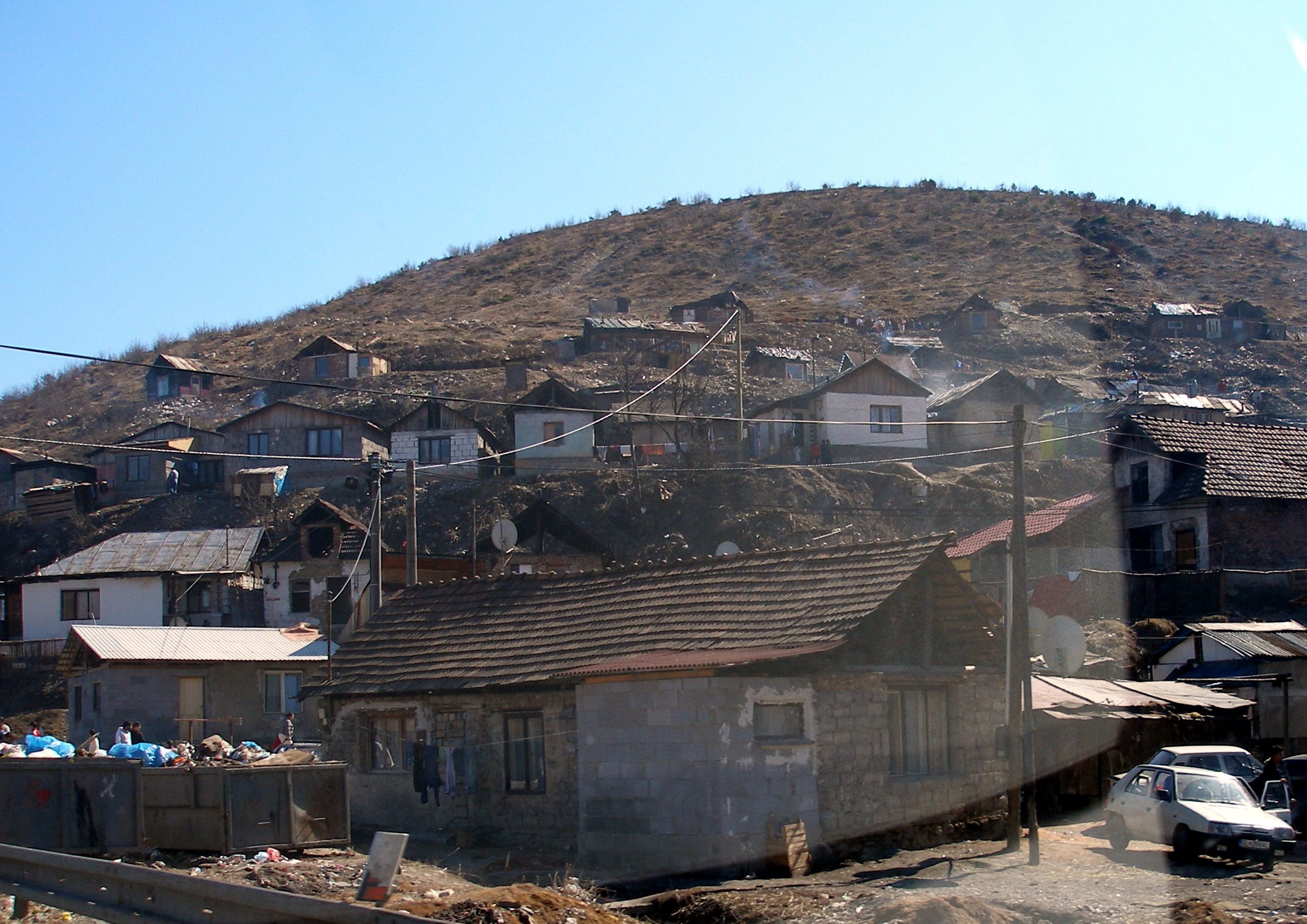 Rómska osada pri obci Richnava, okres Gelnica, región Spiš.